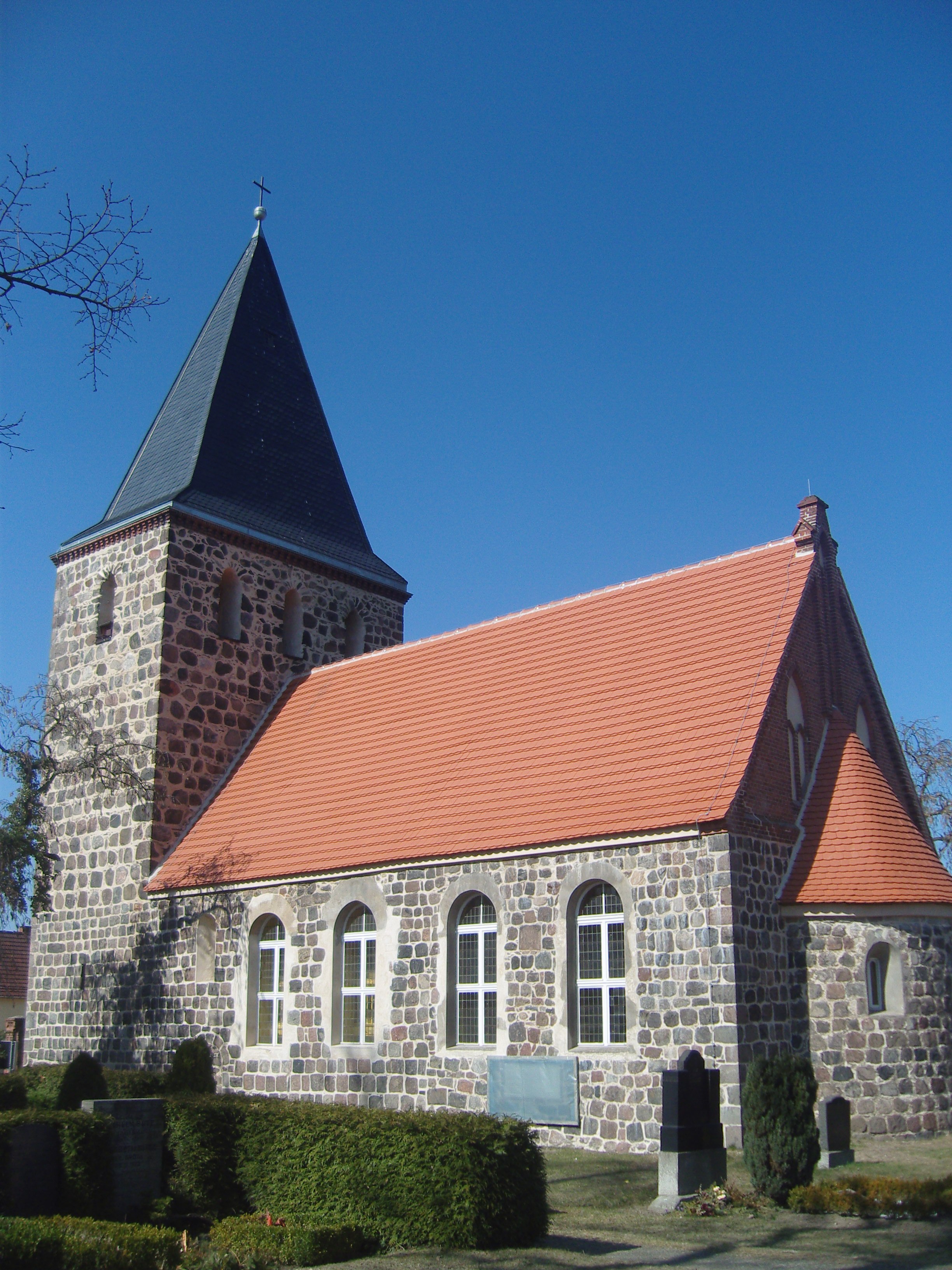 Denkmalgeschützte Dorfkirche in Güterfelde